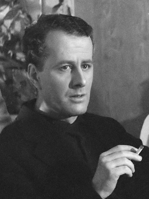 Televisiespel "De Derde" aan boord van de De Prins der Nederlanden, v.l.n.r. Emmy Lopes Dias, Ad Hoeymans, Luc Lutz, Ton Kuyl, Bert van der Linden, Sigrid Kioetse 8 maart 1960